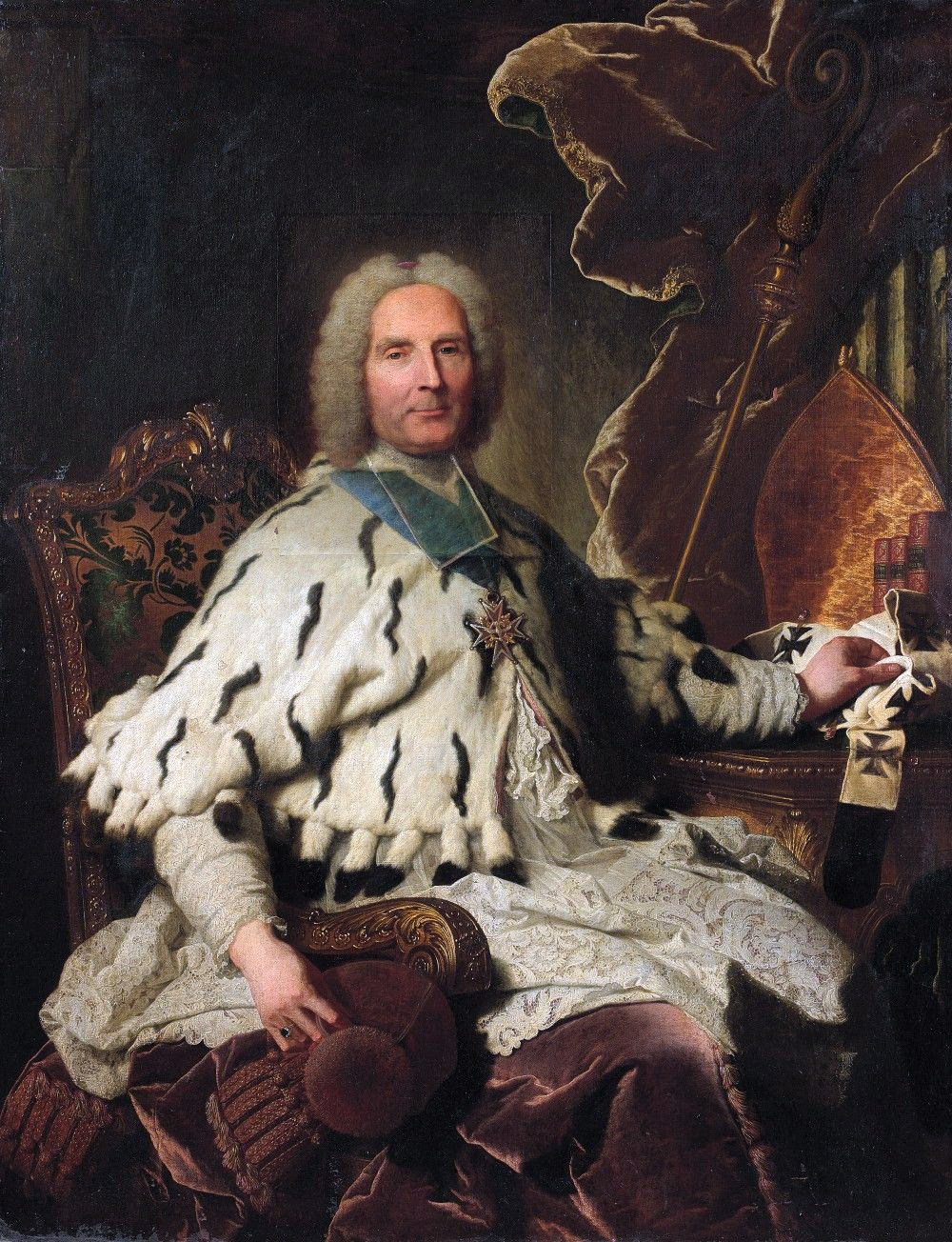 Hyacinthe Rigaud, portrait de l'archevêque de Vienne, 1732-1735. Coll. Priv.